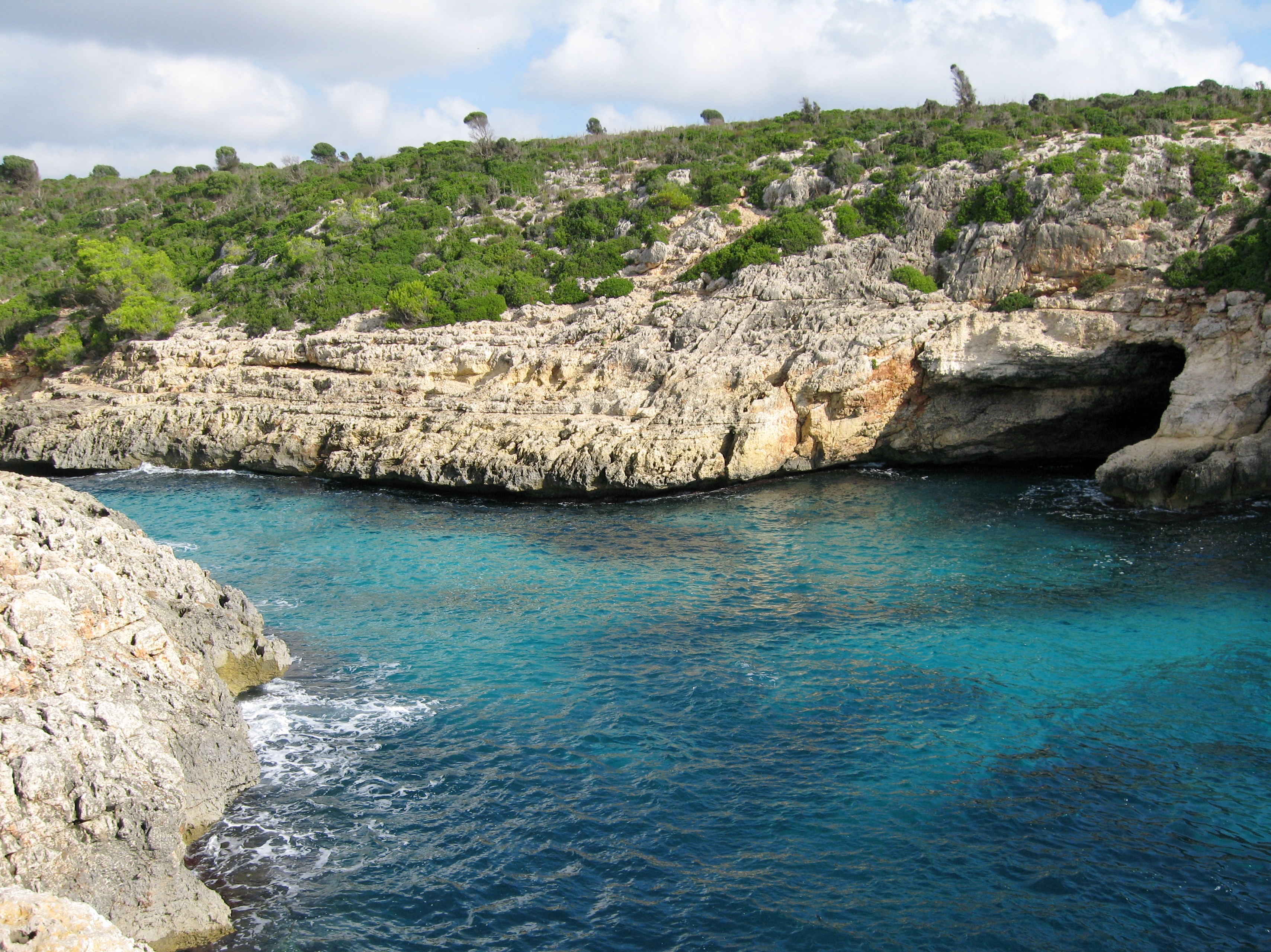 Es Caló Blanc, Cala Varques, Manacor, Mallorca, Spain